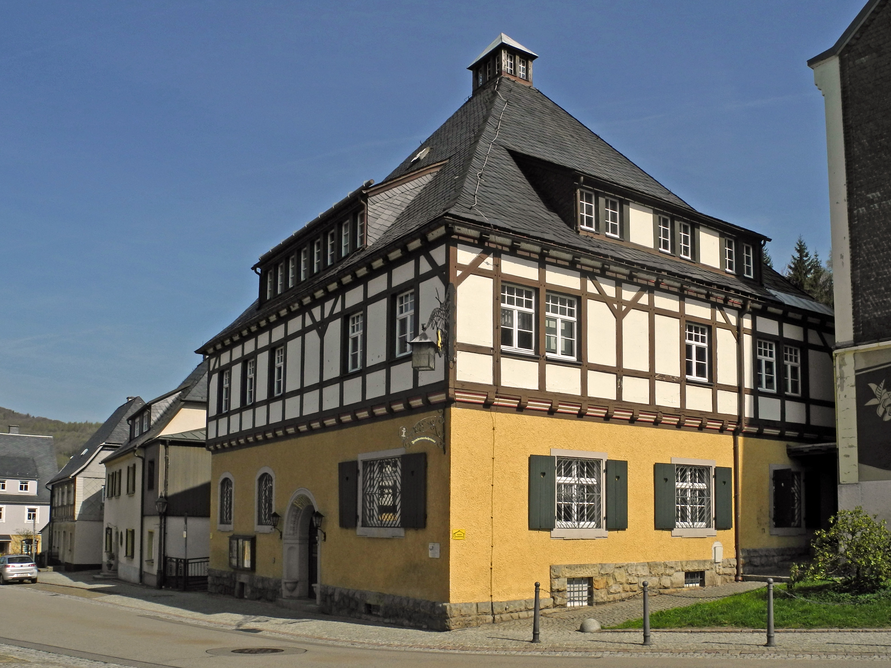 Rathaus in Geising, Hauptstr. 25